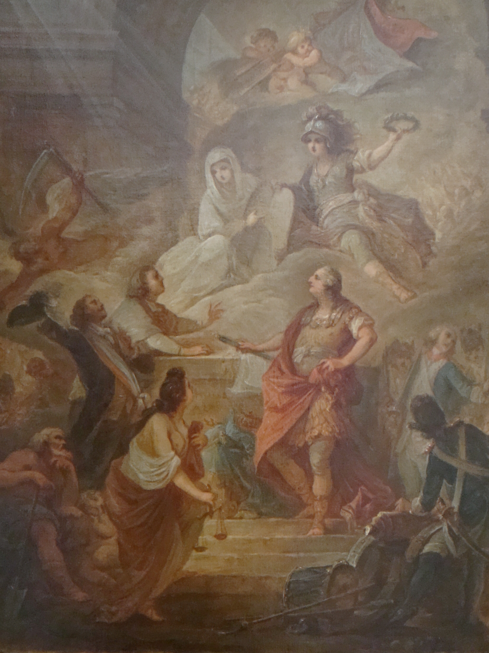 detail